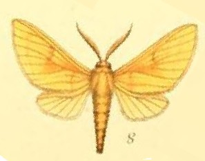 Automolis subulva (Mabille, 1884) (Automolis syntomia)